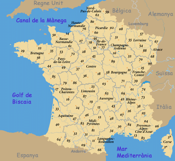 Segons Bild:Frankreich Départements.png és de llicènica lliure, hi he fet les meues modificacions així que ara és de domini públic propi. –Pasqual bústia 14:30, 11 jul 2006 (UTC)